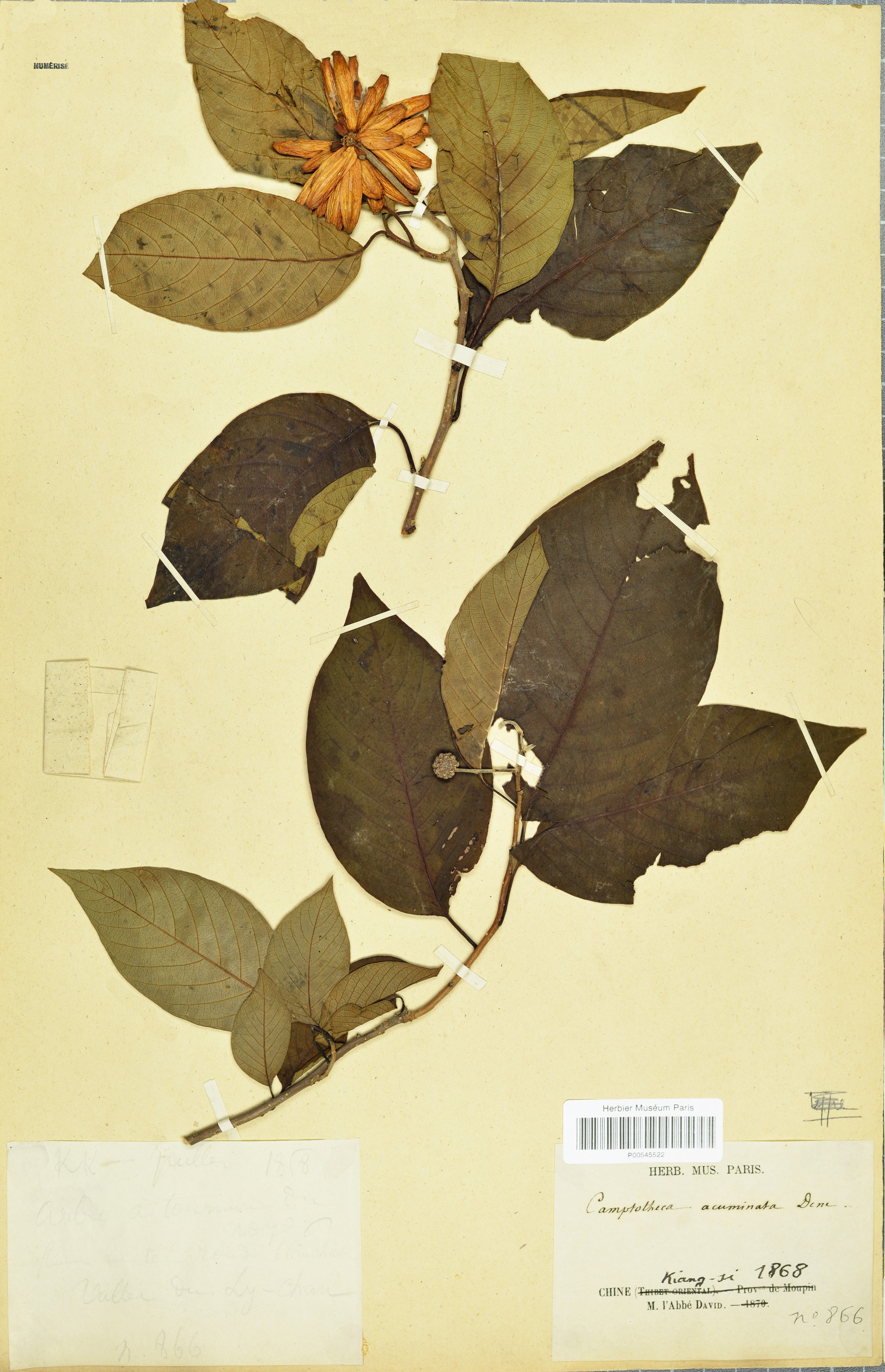 Camptotheca acuminata, spécimen P00545522, de la Collection : Plantes vasculaires, Muséum national d'histoire naturelle, Paris